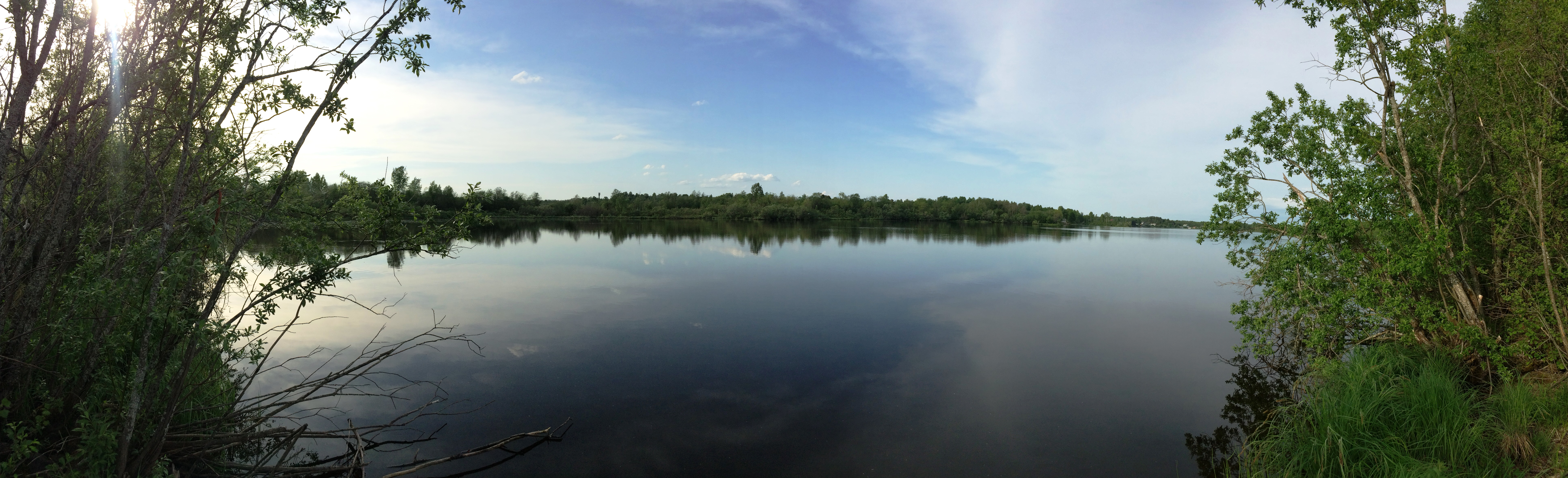 Хлебное озеро (Карелия).